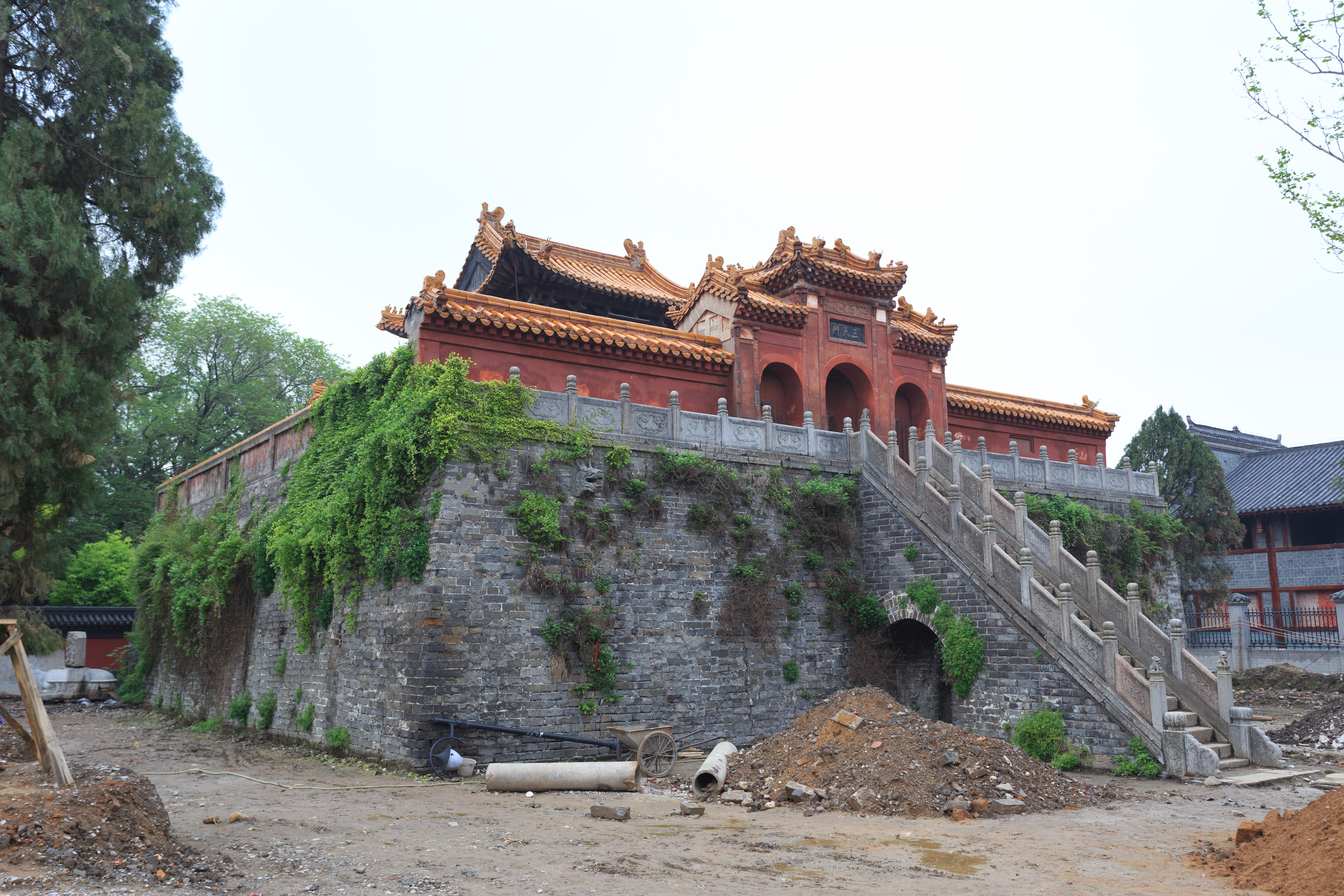 荆州玄妙观—— 三天门和紫霄殿